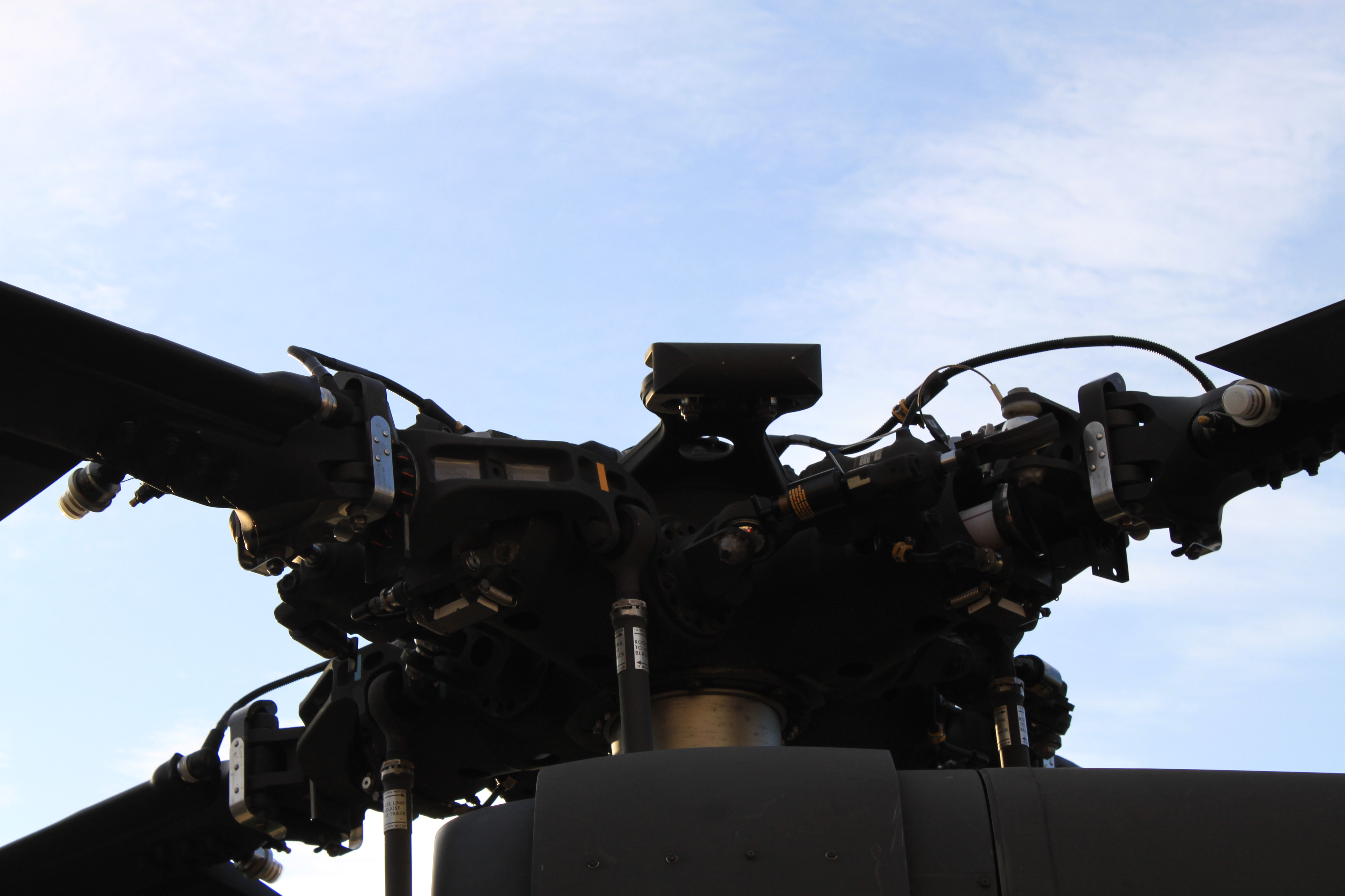 Rotorkopf mit Blattverstell-Mechanik eines Sikorsky UH-60 Black Hawk.